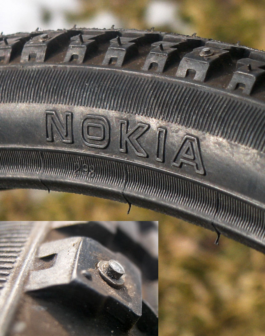 Fahrrad-Winterreifen von Nokia mit Großaufnahme eines Spikes